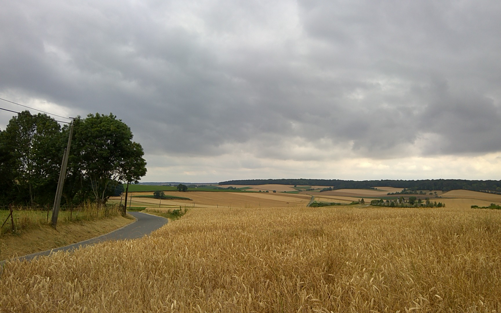 Cormeilles (Oise) vue panoramique du bas du village, avant les moissons.